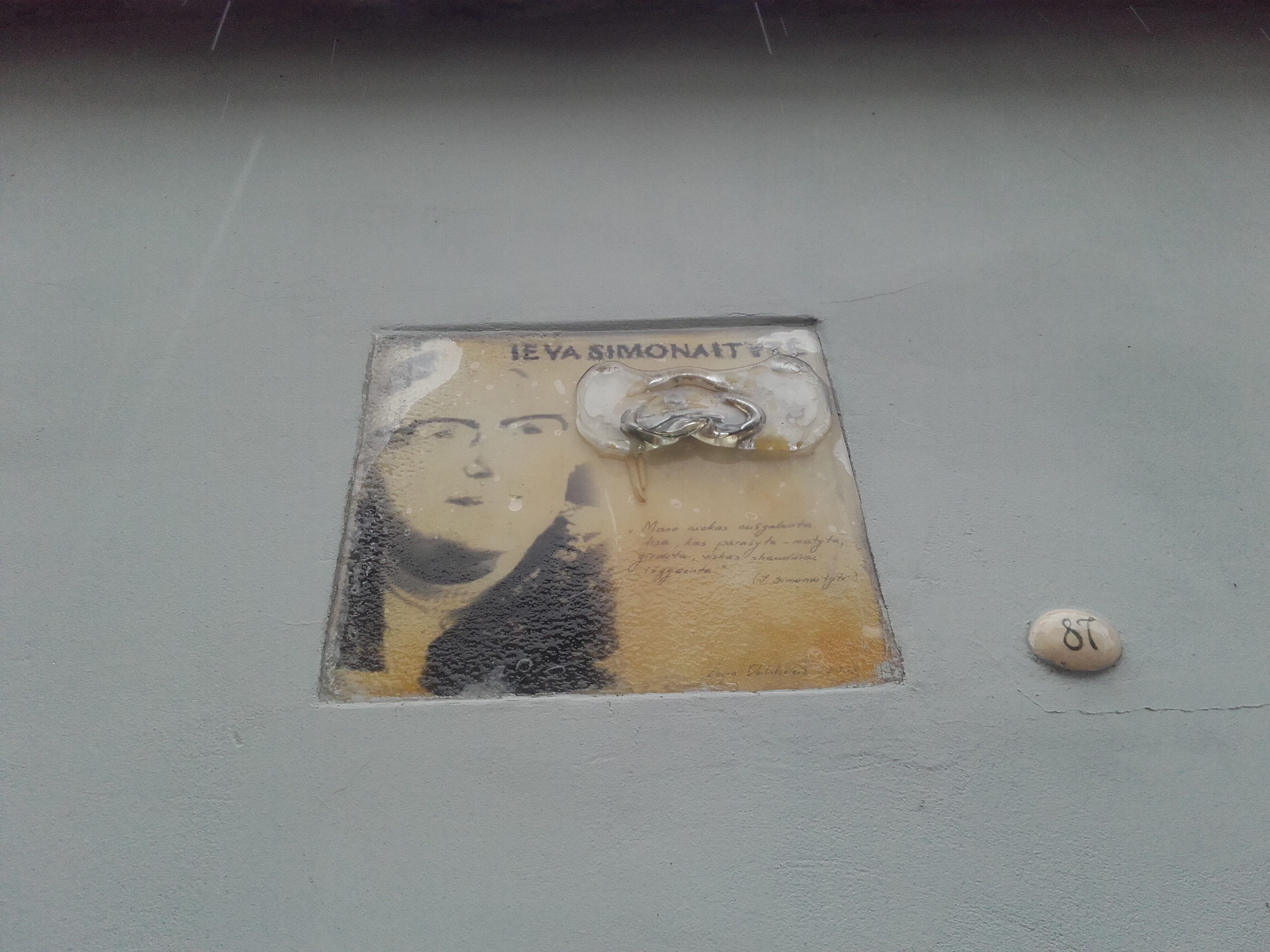 Ievos Simonaitytės memorialinis atvaizdas Literatų gatvėje ant "sienos".